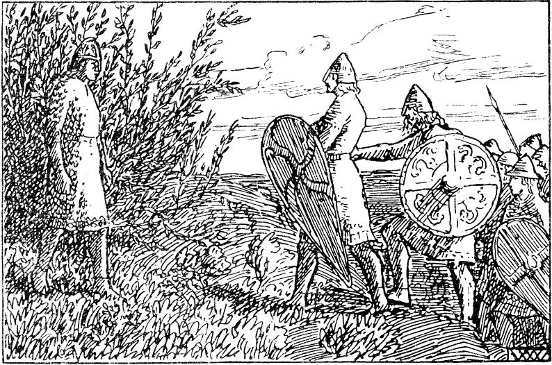 Wilhelm Wetlesen: Illustration for Haraldsønnenes saga (Inges saga), Heimskringla 1899-edition. nn: «Simon Skalp og mennene hans finn kong Øystein.»